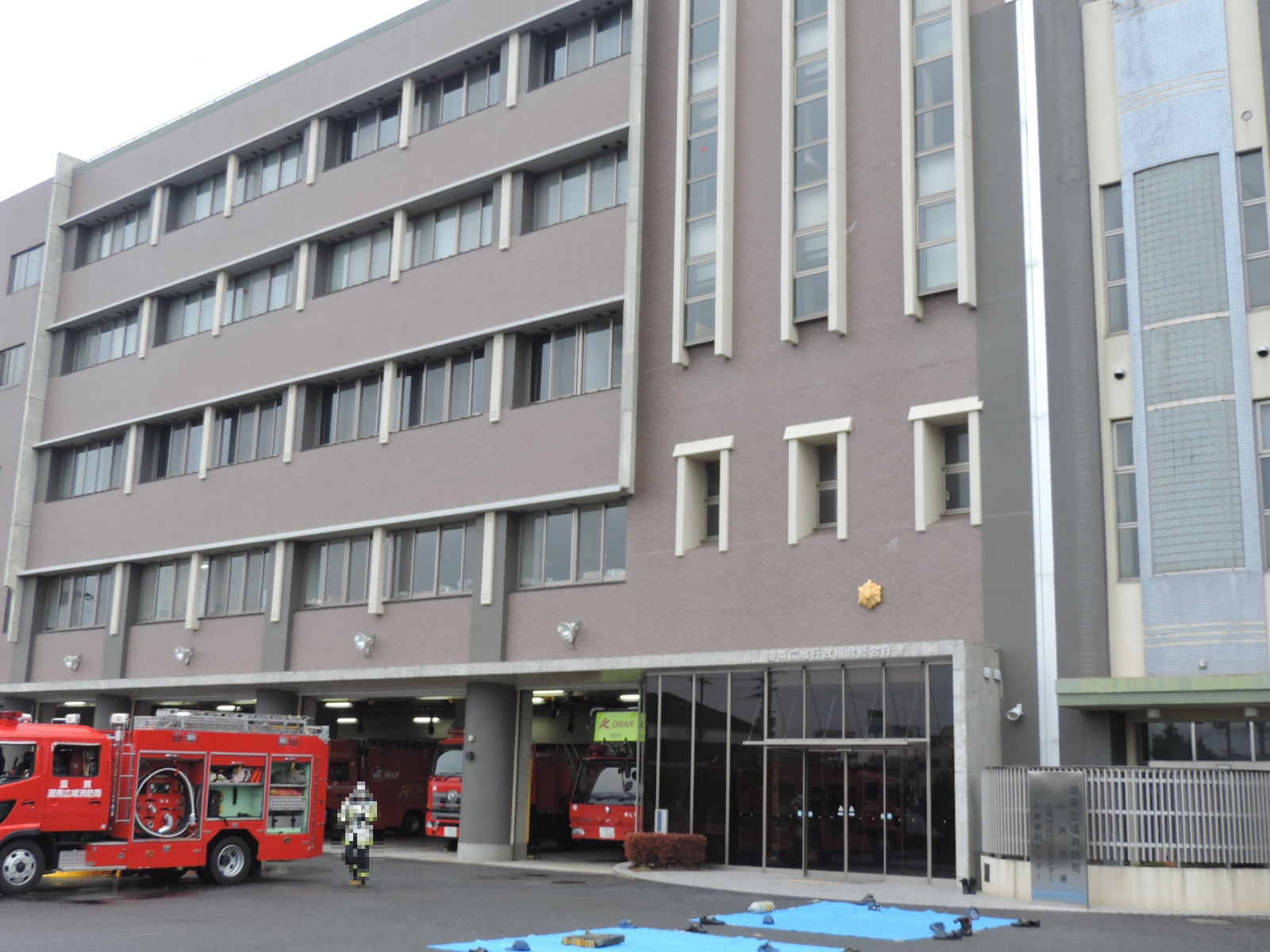 湖南広域行政組合本部。湖南広域消防局を併設している。2017年撮影。